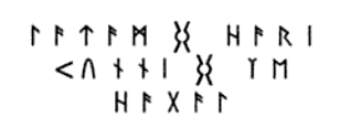 Runen op den Weserrunen-Knaken mit de Inventarnummer 4988, Staatliche Museum för Naturkunn un Vörgeschicht in Ollnborg.